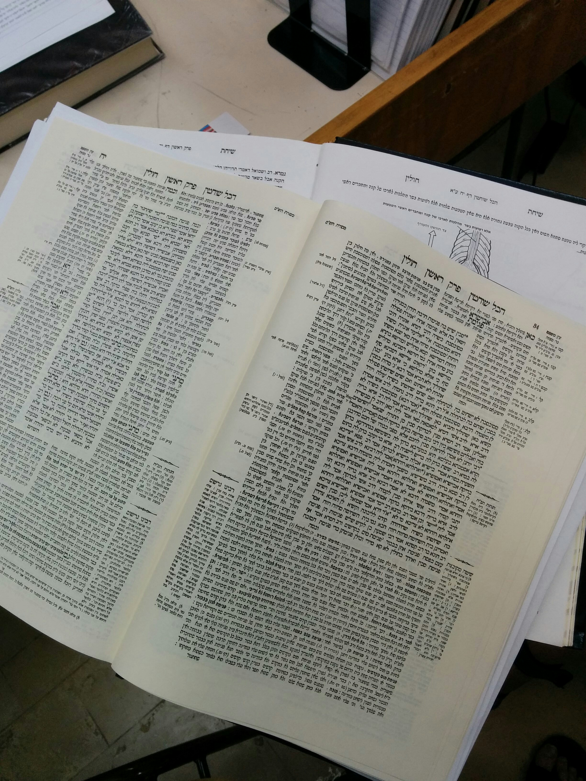 תמונה של גמרא מסכת חולין.